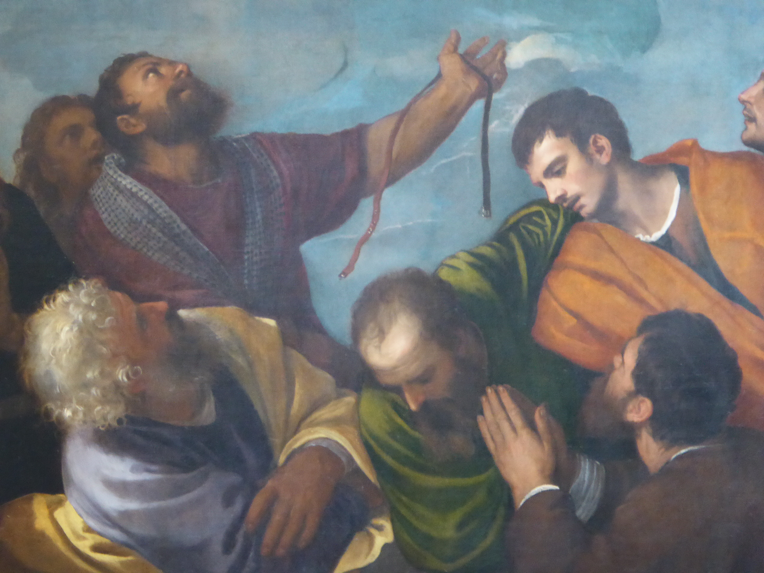 Tizian, Assunta im Dom von Verona (Detail)